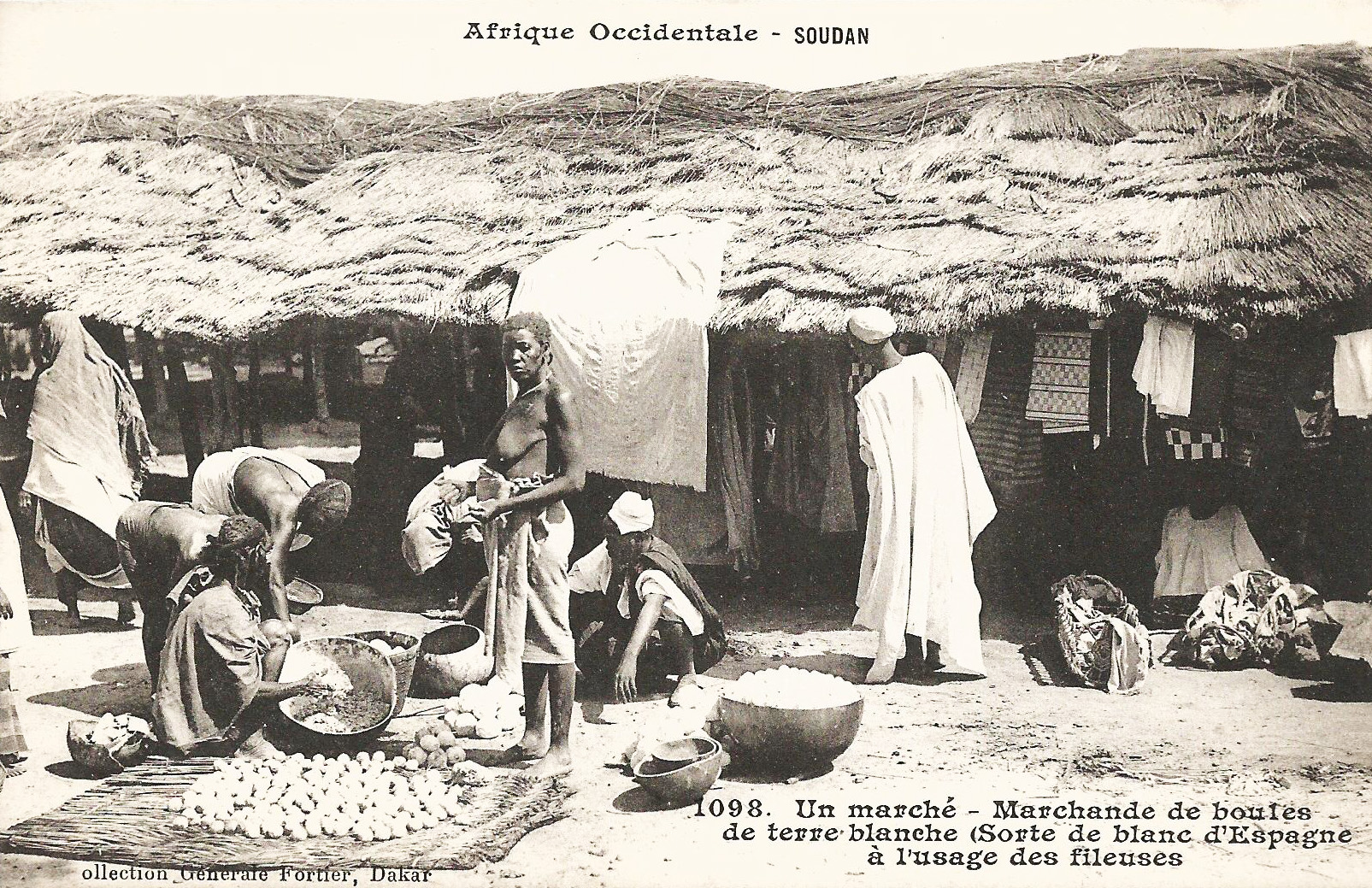 François-Edmond Fortier, Marchande de boules de terre blanche à l'usage des fileuses (sorte de blanc d'Espagne). Afrique Occidentale - Soudan.